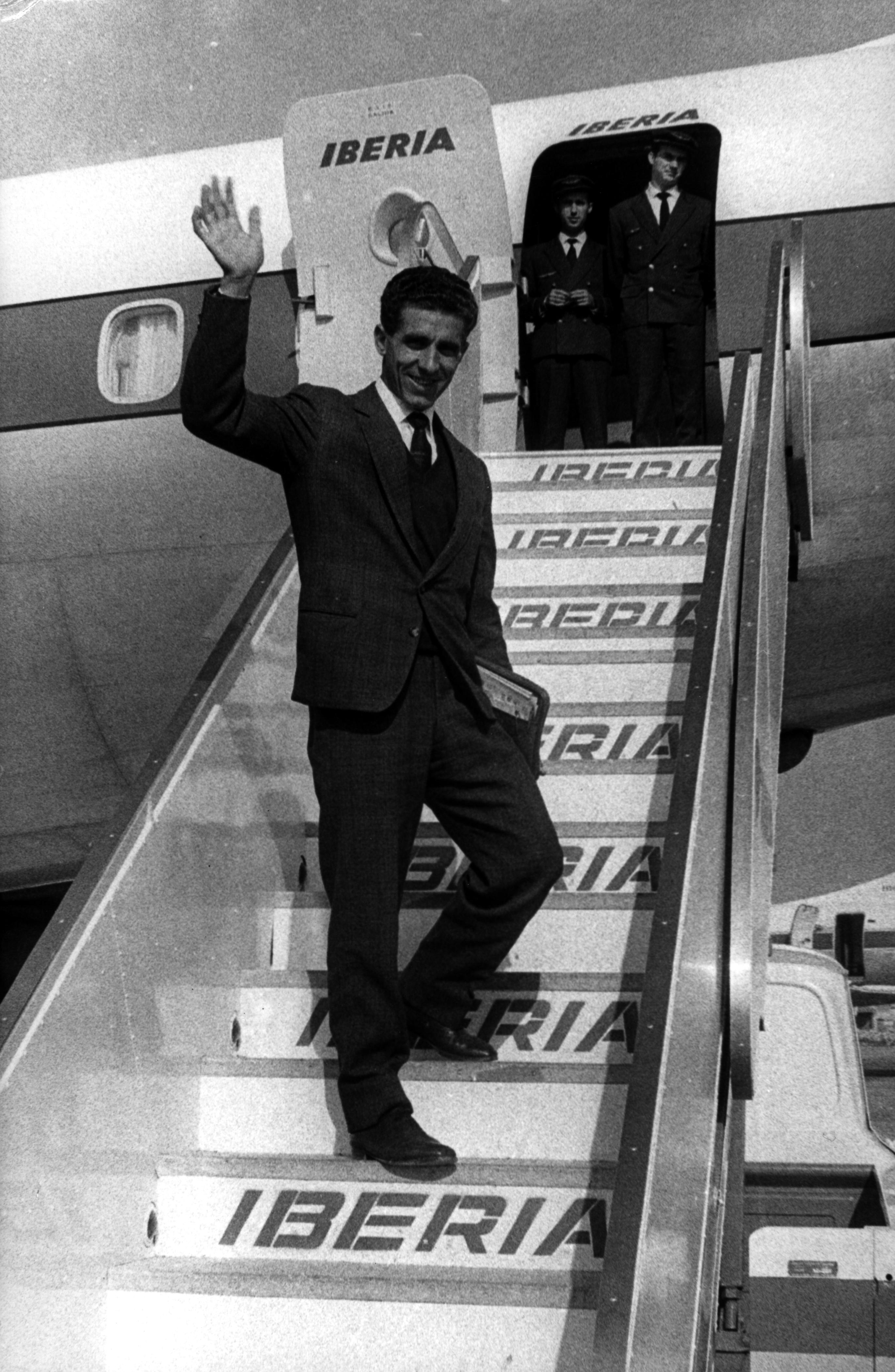 El ciclista Federico Martín Bahamontes embarcando en un avión de Iberia en 1959.